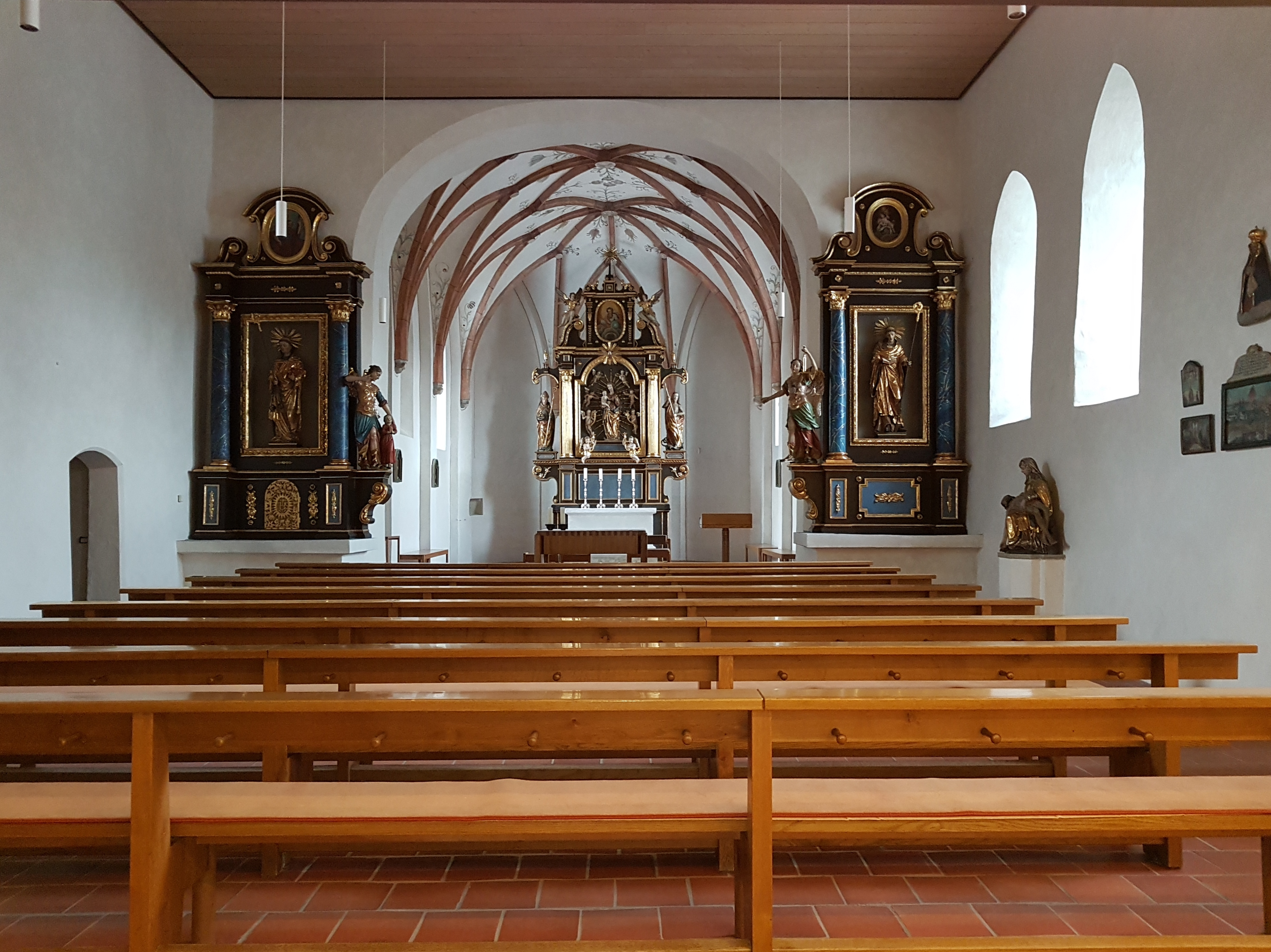 St. Nikolaus (Neuried bei München)